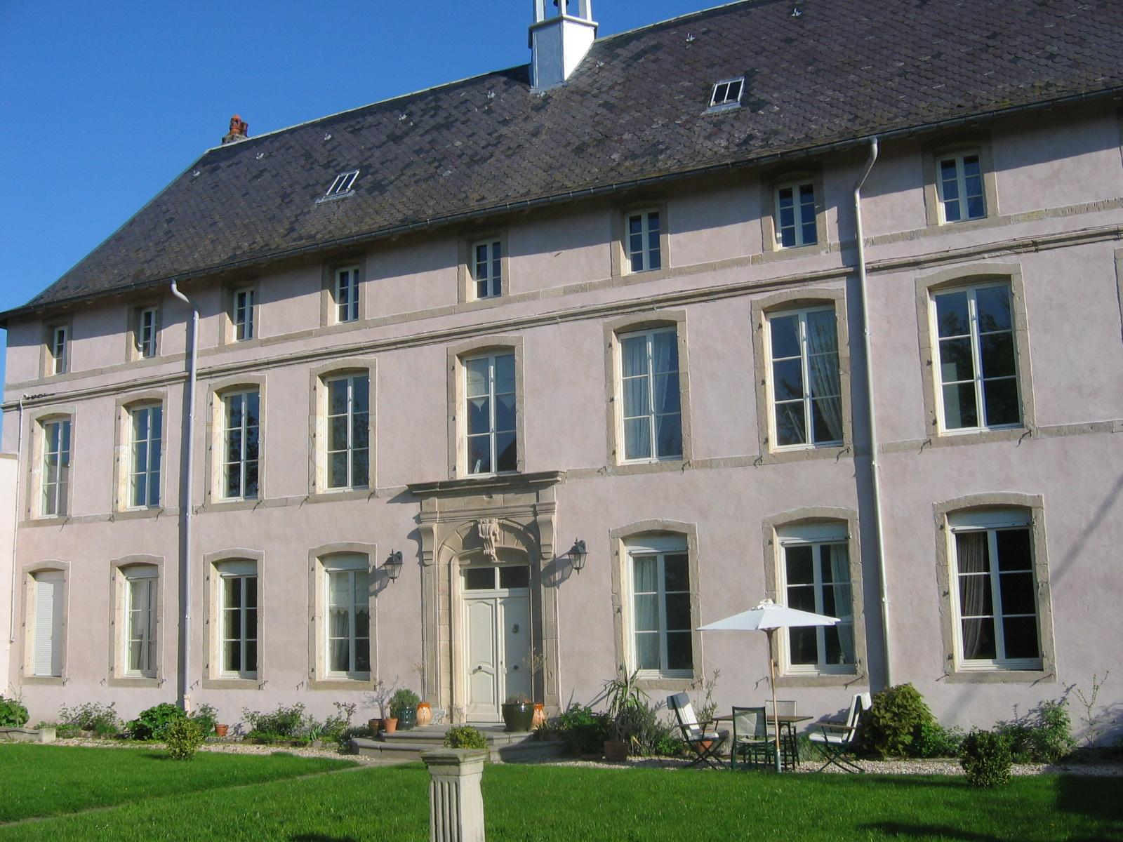 Façade principale du Château de Failloux, Epinal/Jeuxey (France)